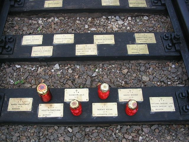 Tabliczki na pomniku w Otłoczynie po renowacji w 2003 roku